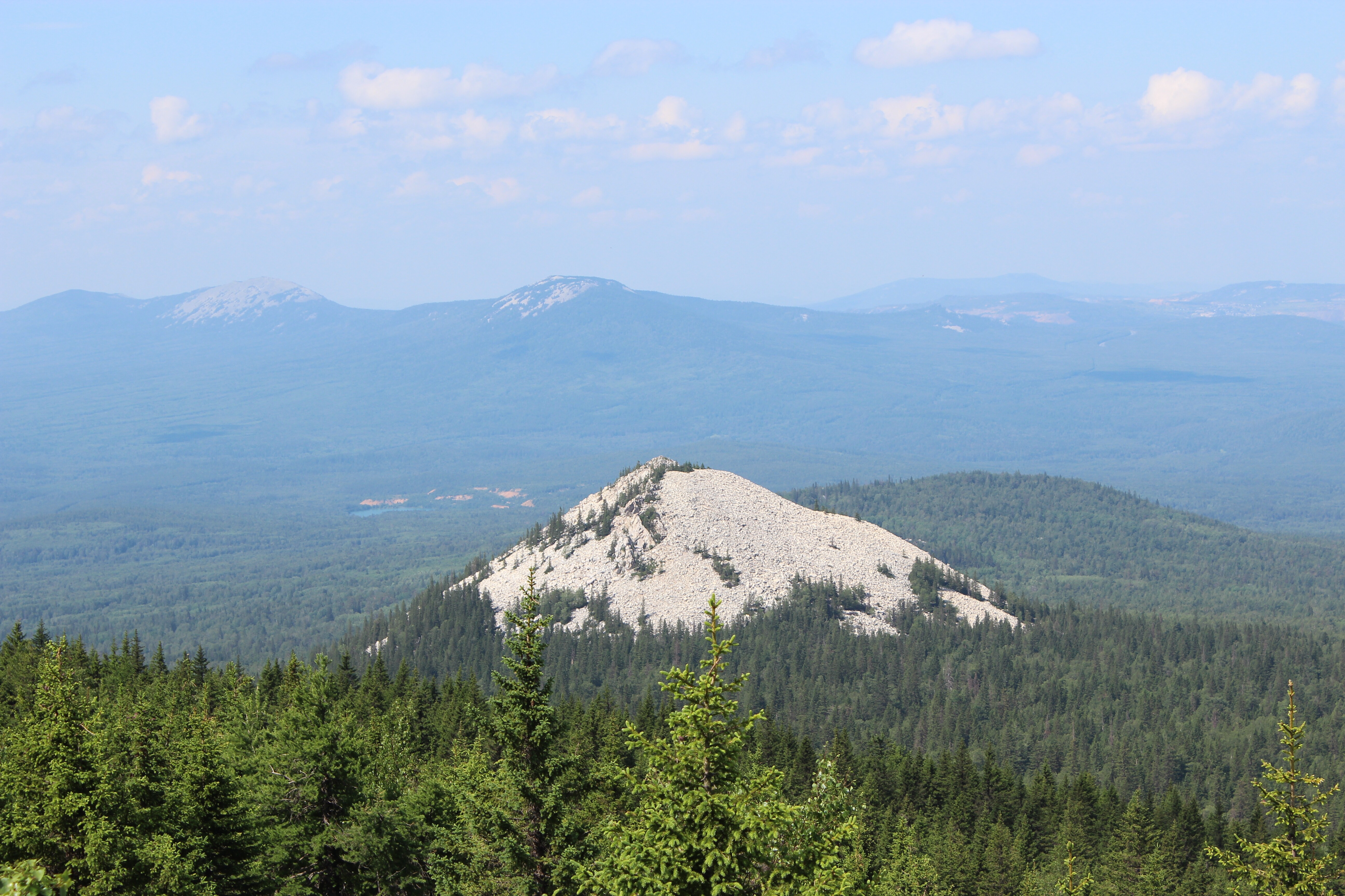 Национальный парк «Зюраткуль», Саткинский район This image is related to the protected area of Russia number 7400246